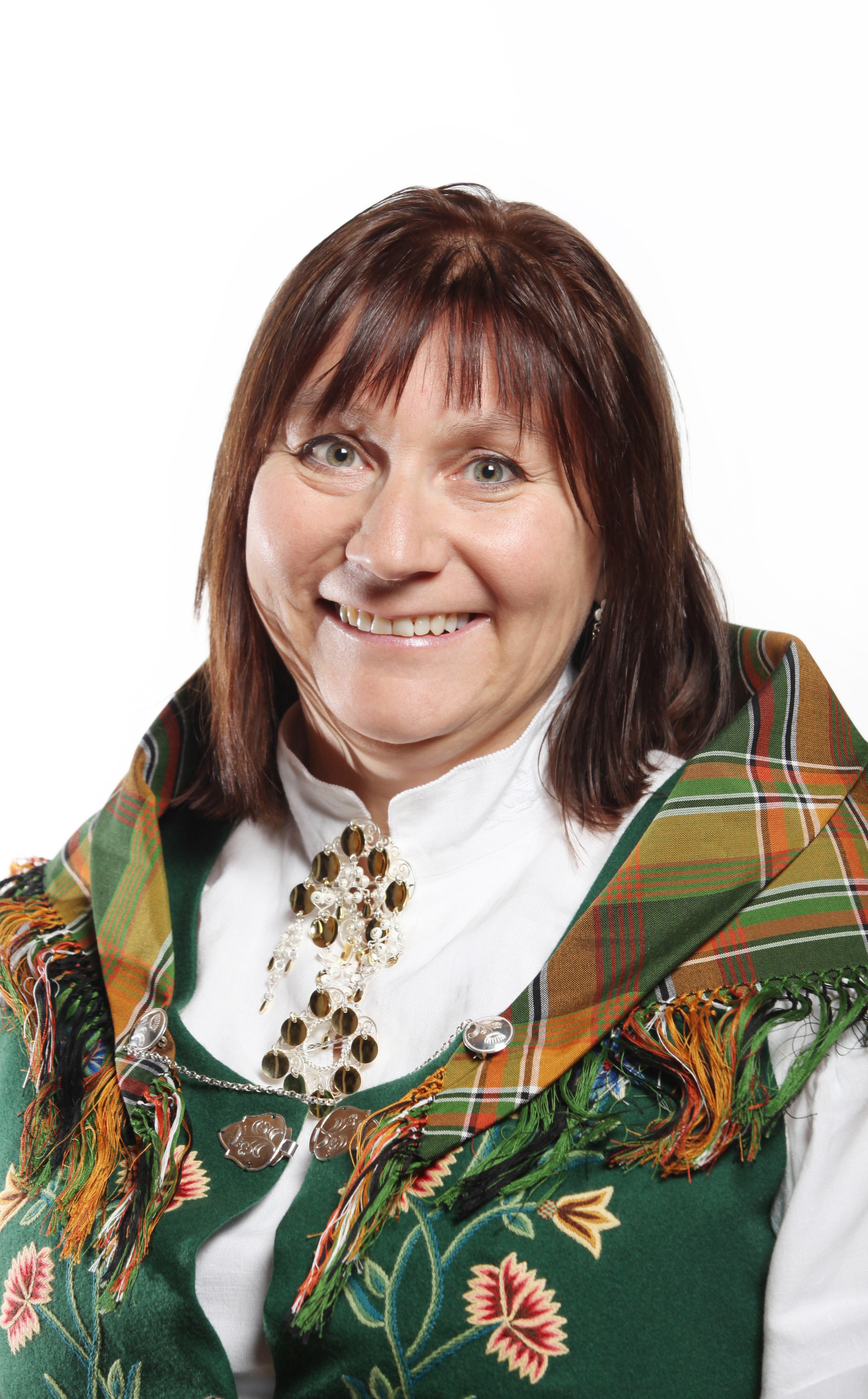 Medlem av. Foto Kenneth Hætta / Sametinget.